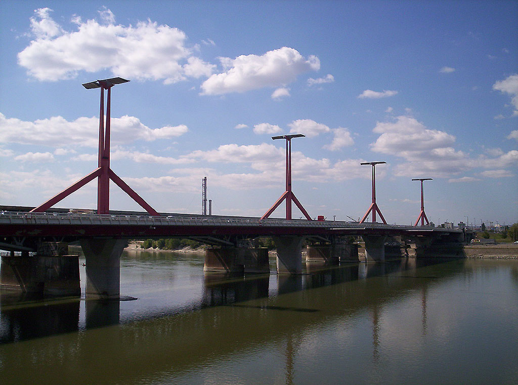 Budapest, Lágymányosi híd